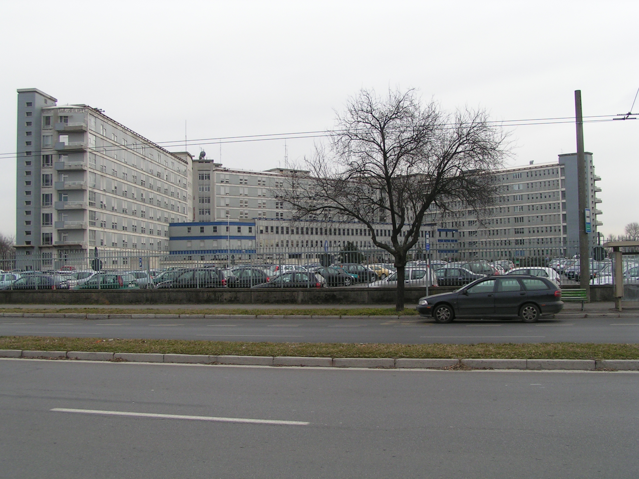 L'ospedale maggiore di Cremona